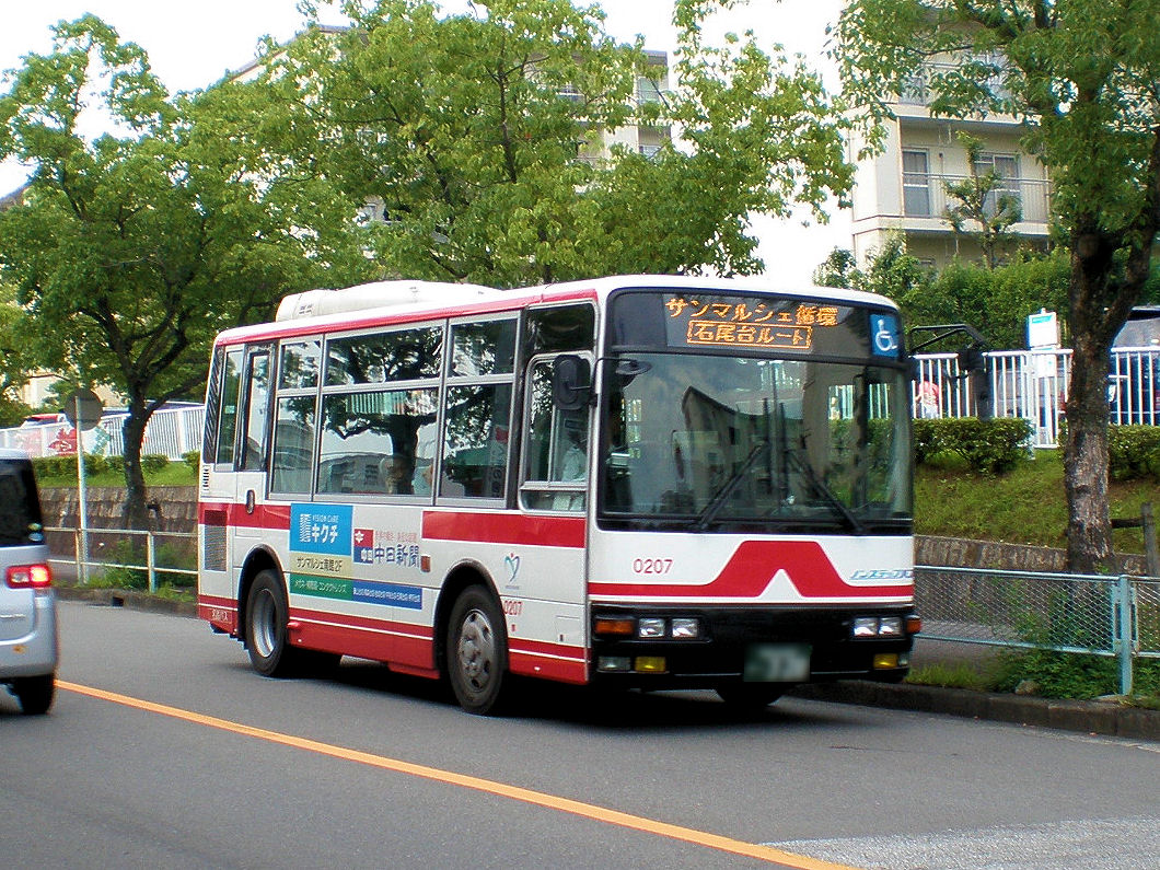 愛知県春日井市を走るサンマルシェ巡回バス